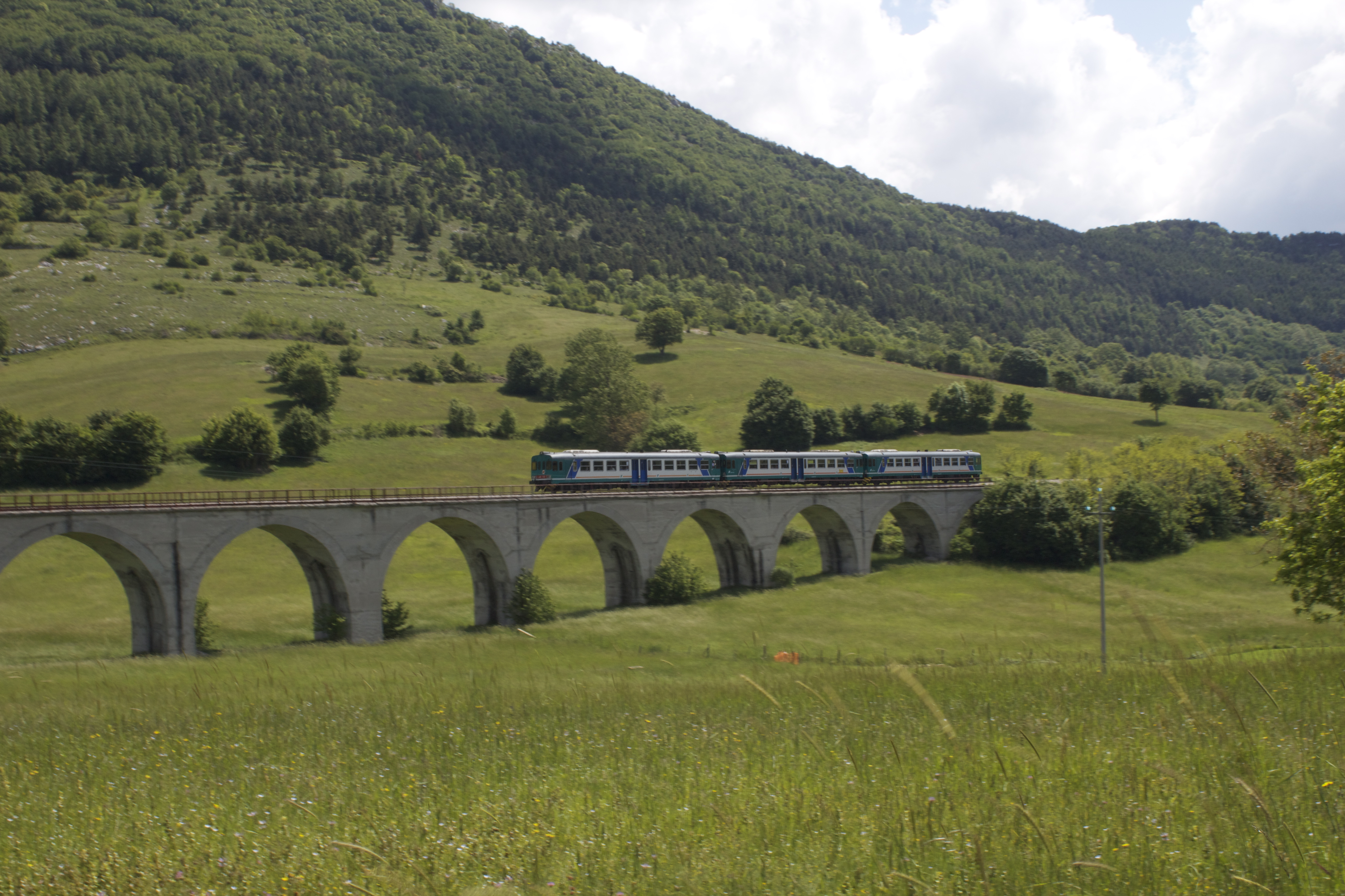 Ponti linea ferroviaria Sulmona - Carpinone This is a photo of a monument which is part of cultural heritage of Italy.